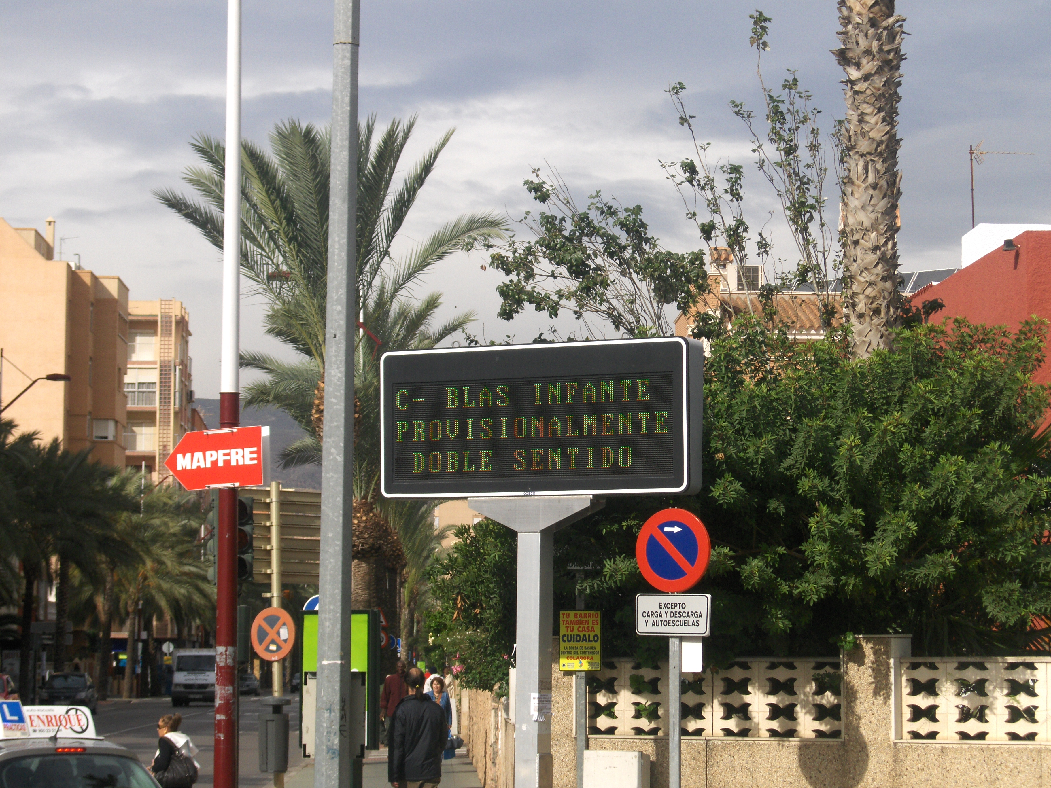 Panel de información en directo sobre el tráfico, Almería